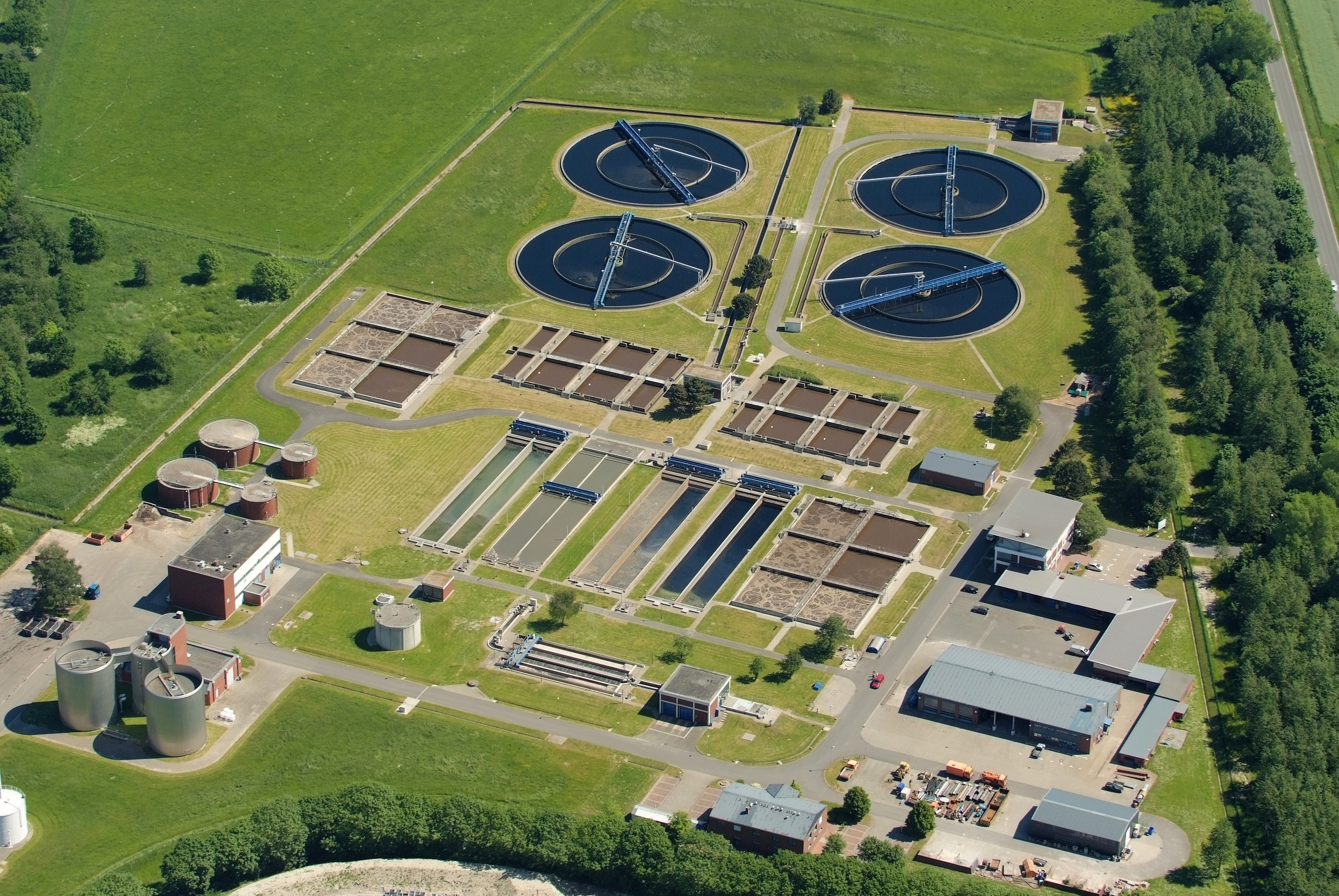 Abwasseraufbereitungsanlage in Wilhelmshaven. Fotoflug vom Flugplatz Nordholz-Spieka über Cuxhaven und Wilhelmshaven